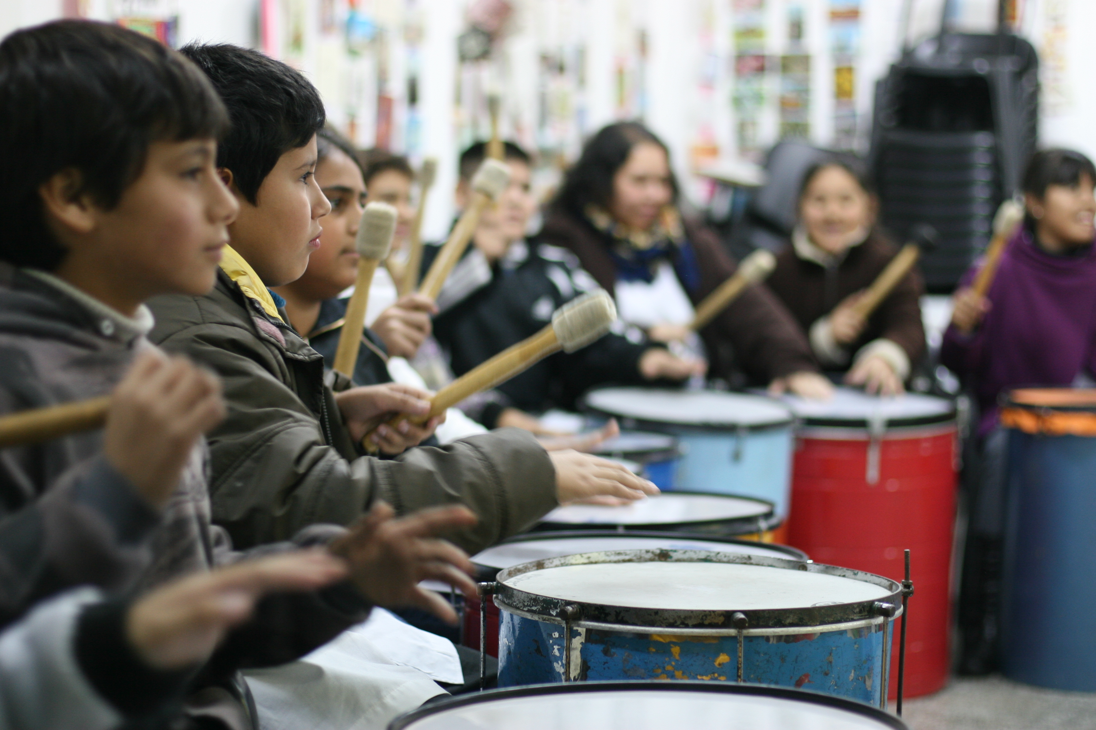 Taller de musica para chicos